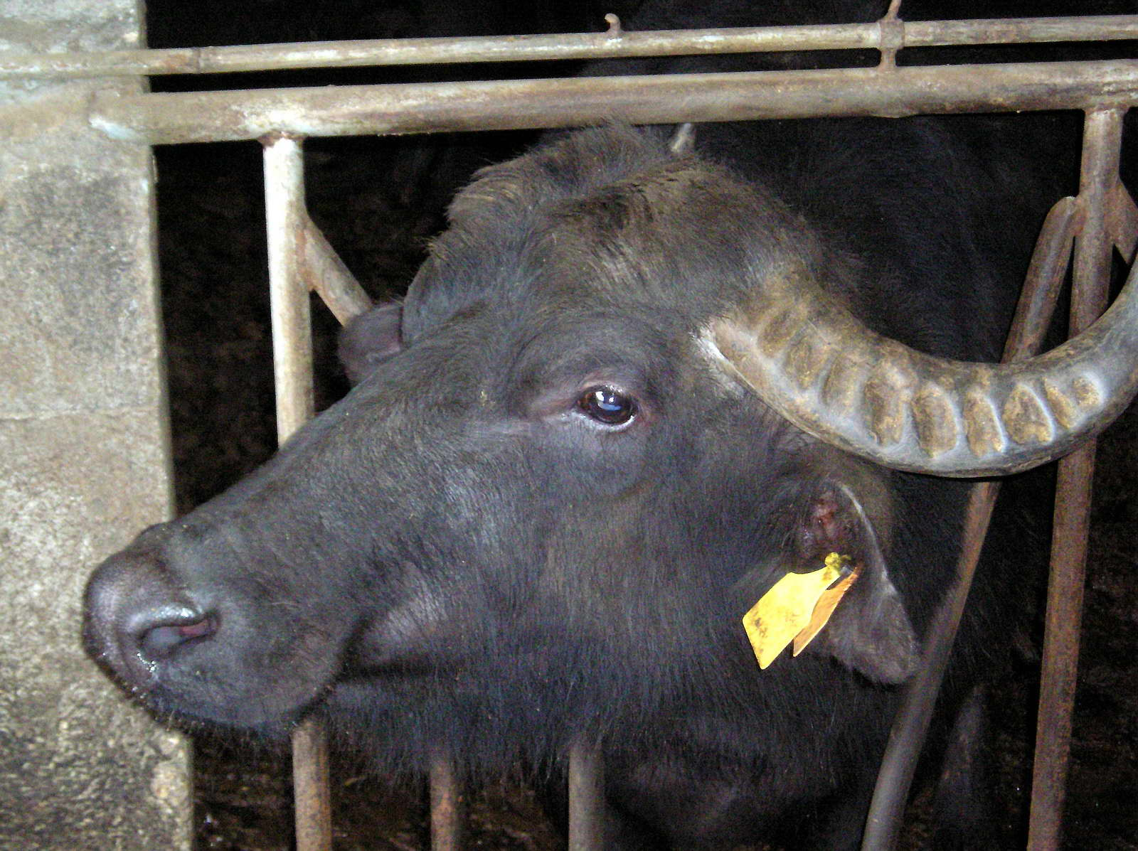 Búfalo da granxa que hai en Boqueixón (Galicia) para a elaboración de queixo mozzarella